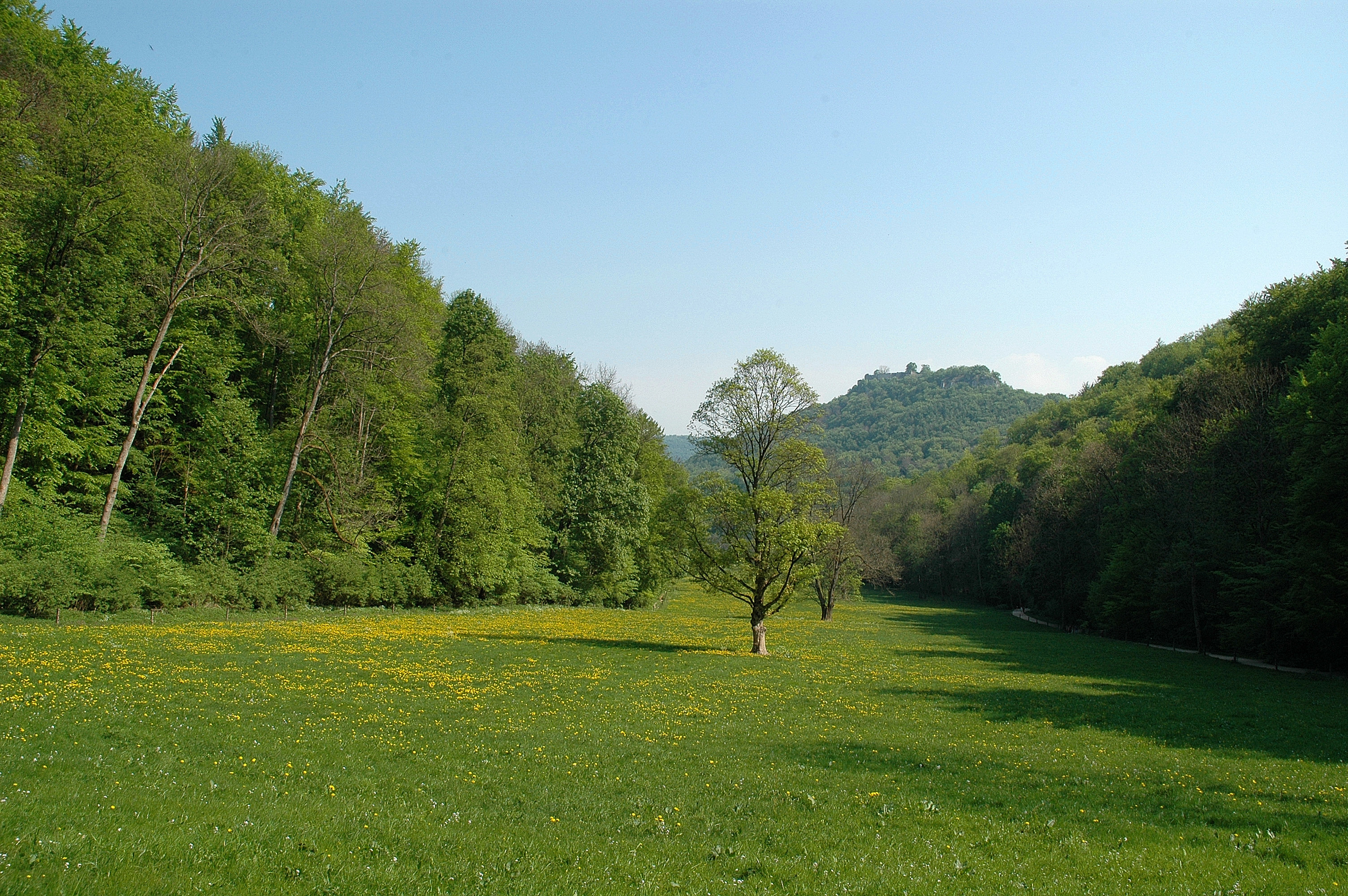 FFH-Gebiet „Uracher Talspinne“, Wiese unterhalb Uracher Wasserfall